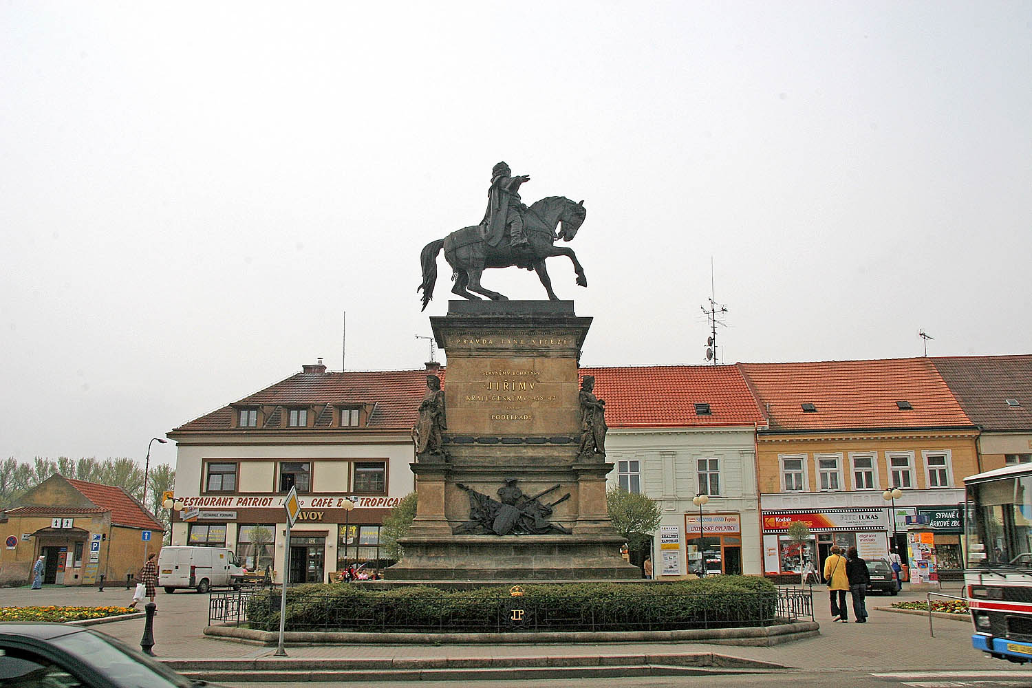 Socha Jiřího z Poděbrad na náměstí v Poděbradech autor: Prazak date: 28. 4. 2006